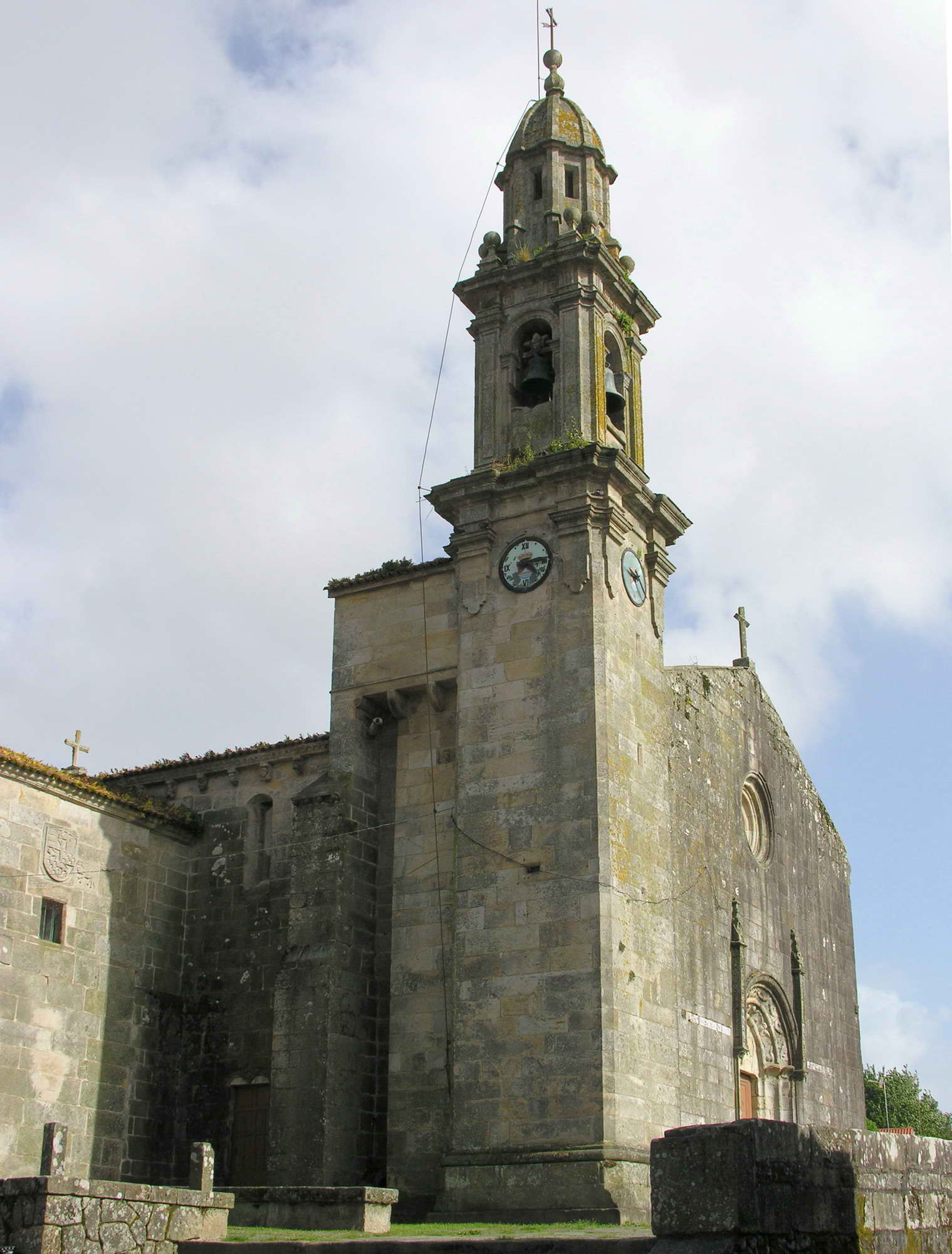 Rianxo, Galicia, Spain, 2006 Publish by= Luis Miguel Bugallo Sánchez. Self made